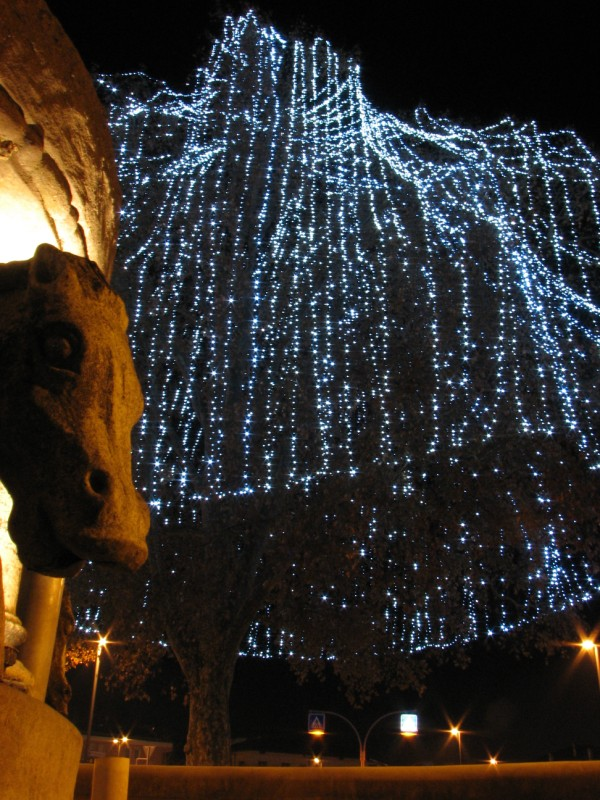 Il grande platano di piazza Gavazzi illuminato, in Pergine_Valsugana.